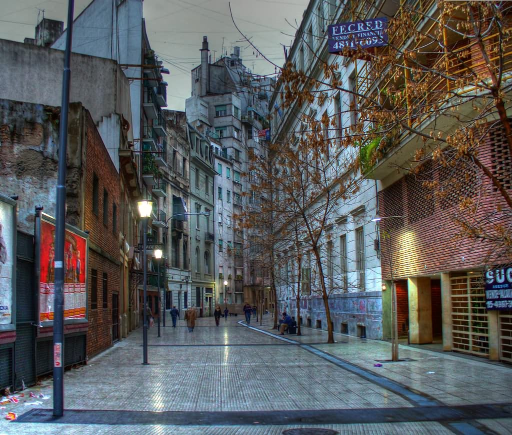 La Porteña